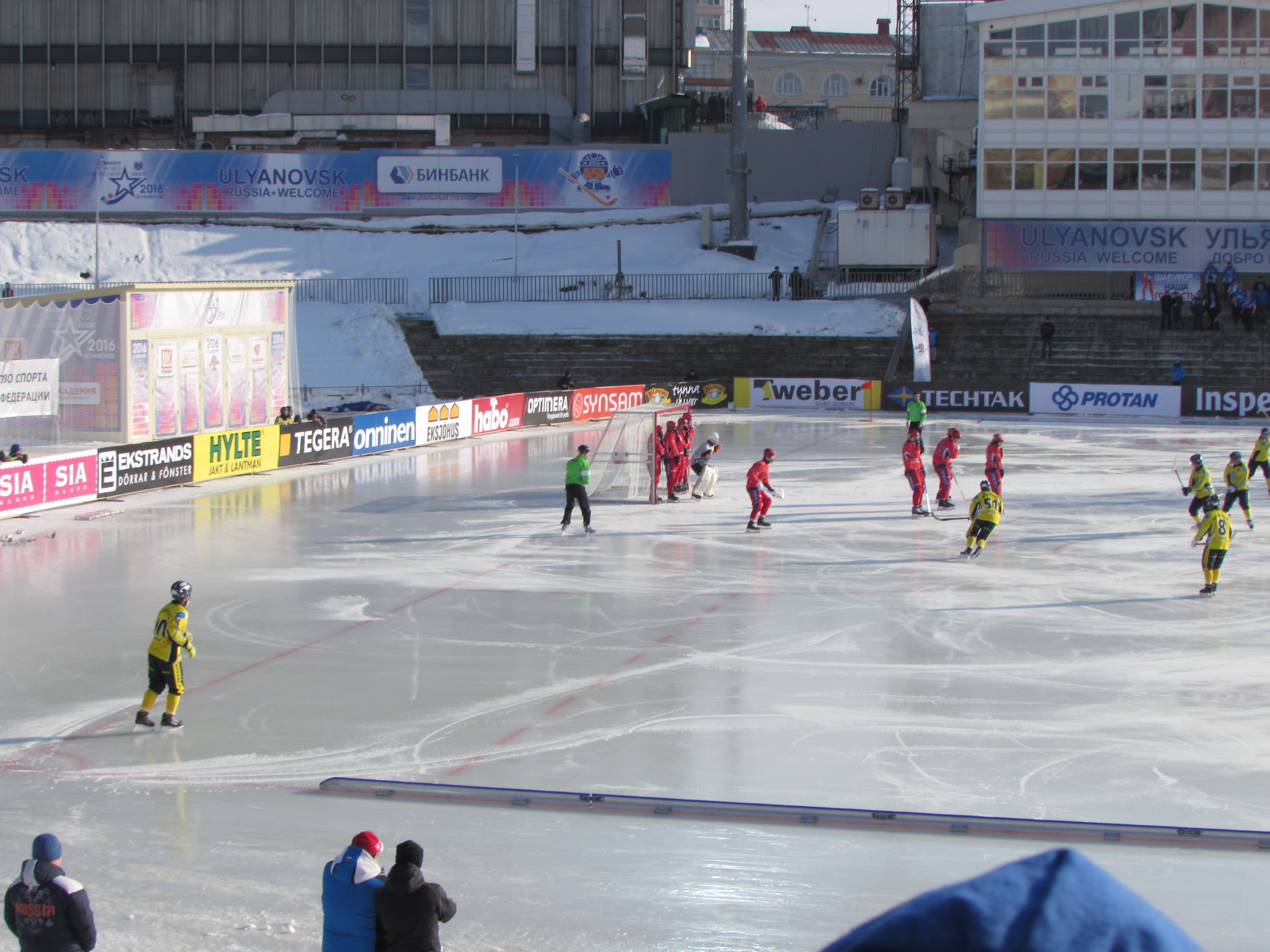 Півфінал Росія – Казахстан 2016 р.